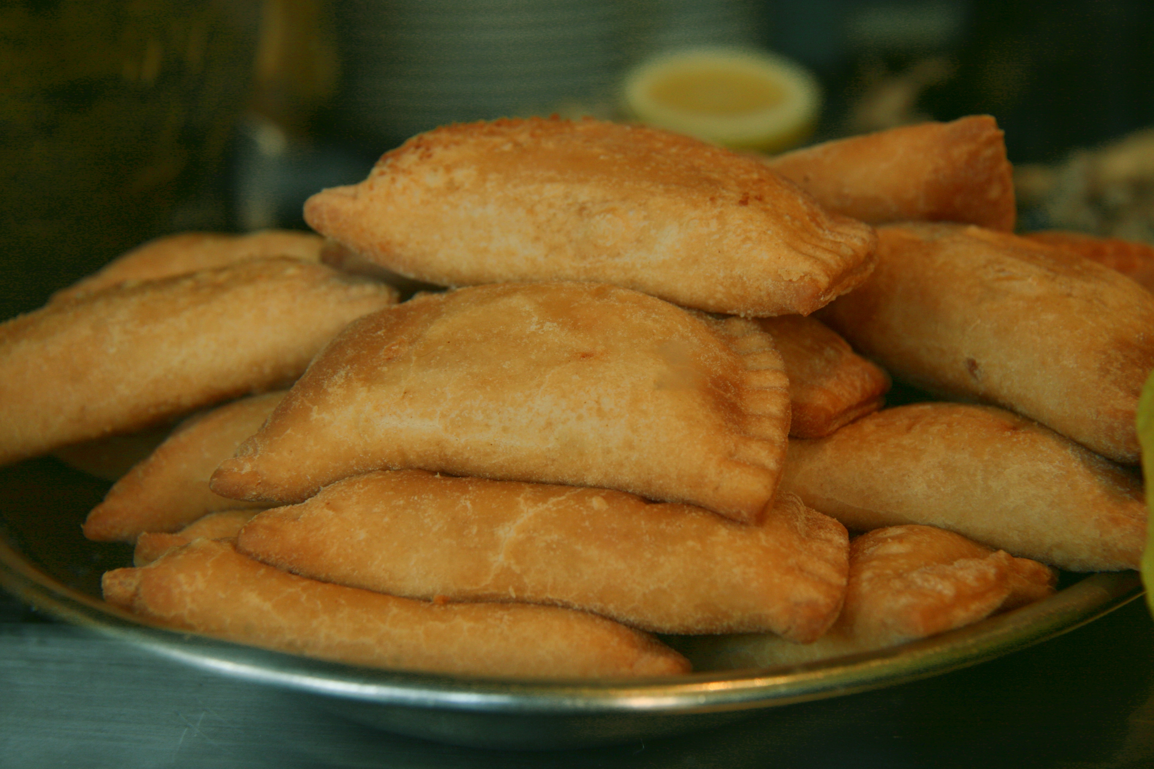 Empanadilla española - Madrid